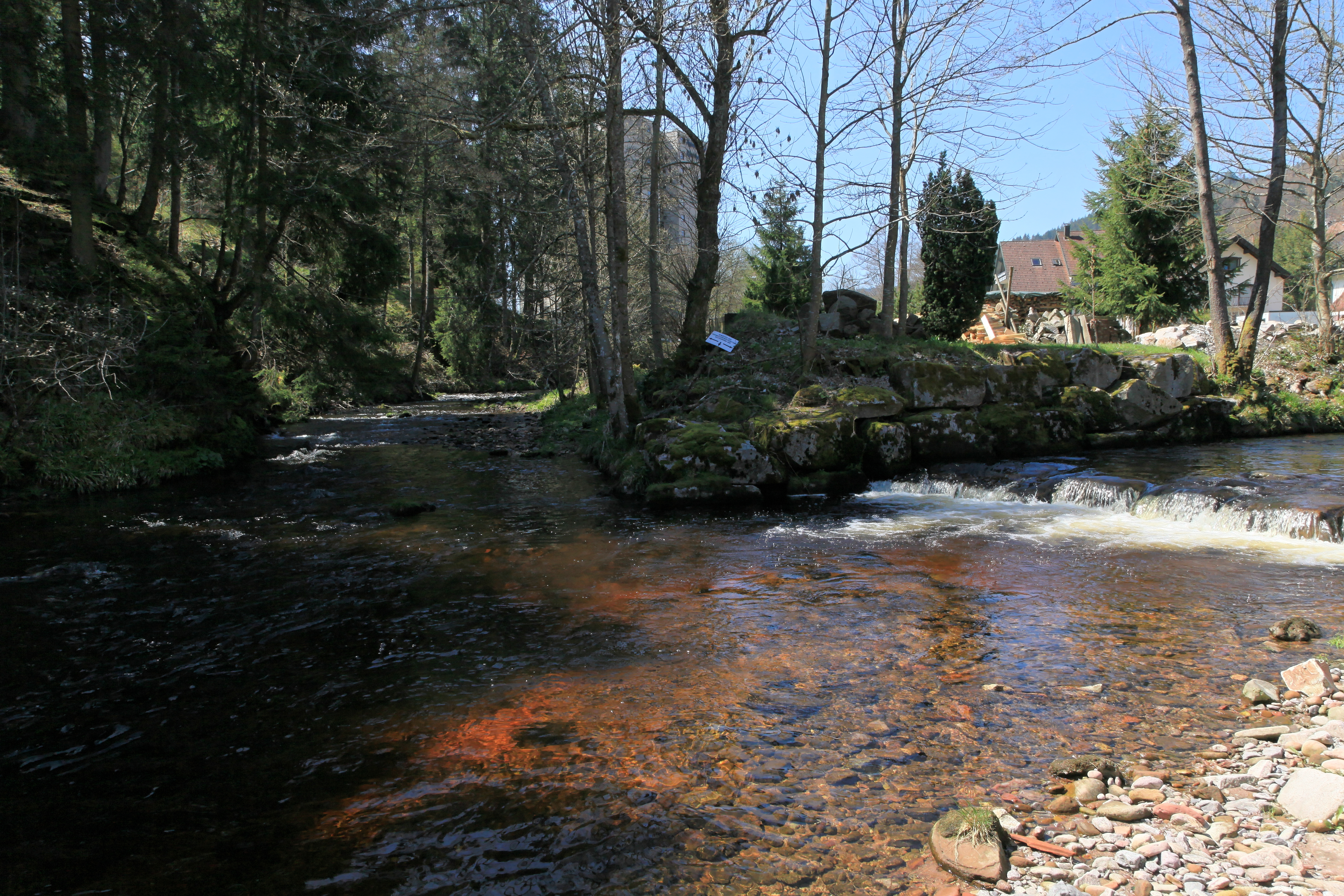 Rechtmurg (links oben) und Rotmurg (rechts oben) münden zusammen und bilden die Murg (unten), Rechtmurgstraße / Ruhesteinstraße (hinter Hotel Adler-Post) in Obertal Baiersbronn